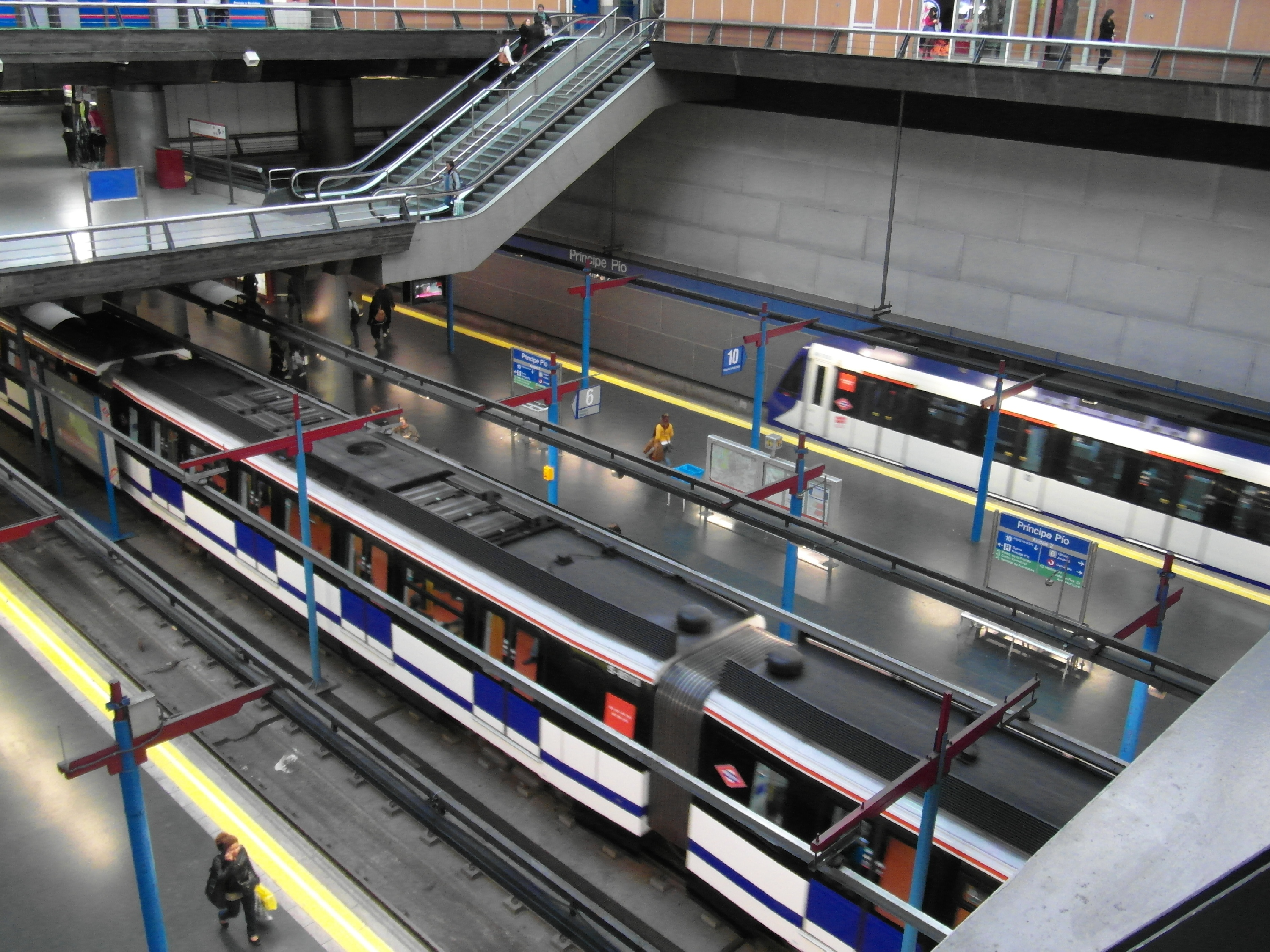 Madrid - Estación de Príncipe Pío